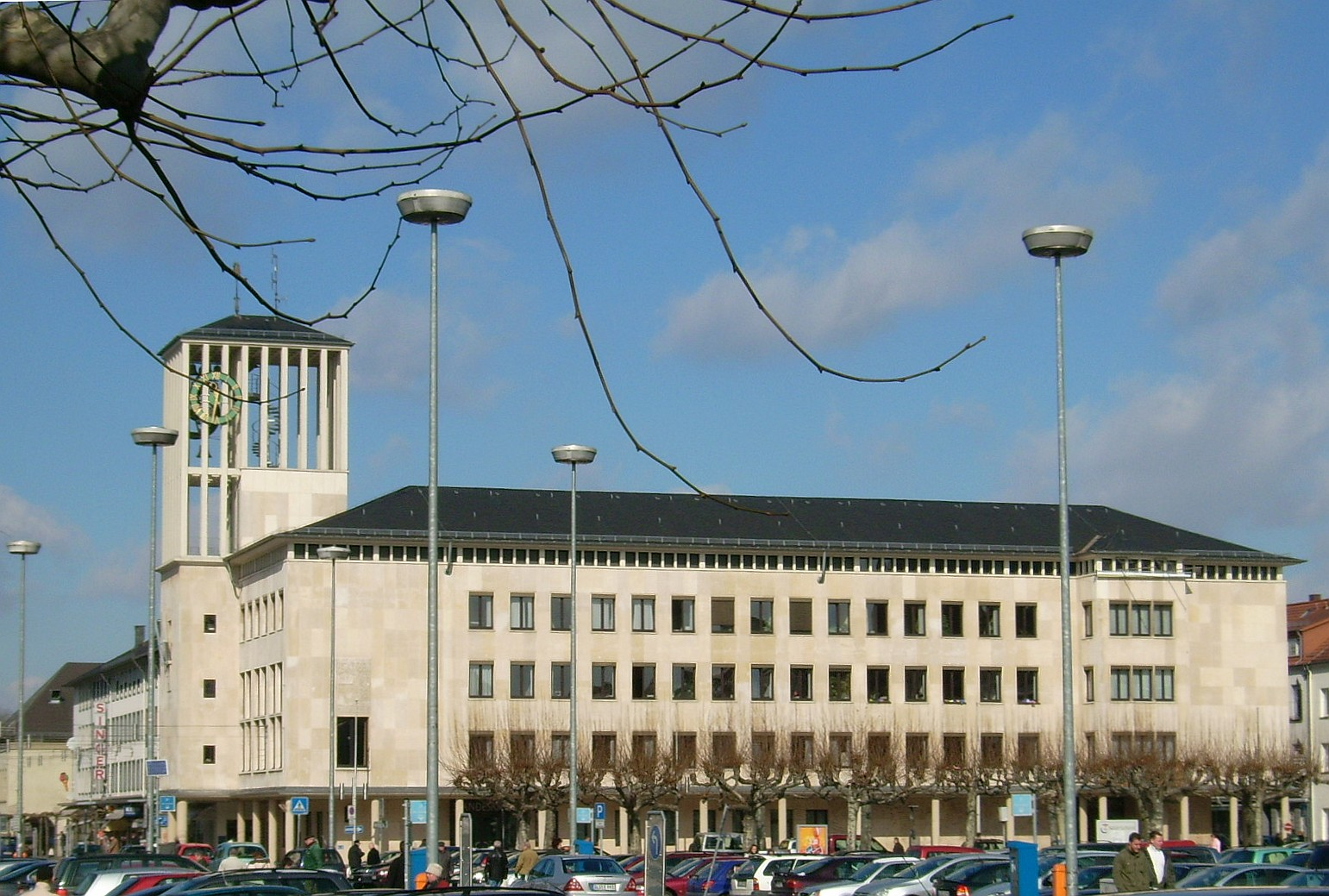 Bildbeschreibung: Rathaus Saarlouis Quelle: selbst fotografiert Fotograf: Lokilech Datum: siehe Metadaten